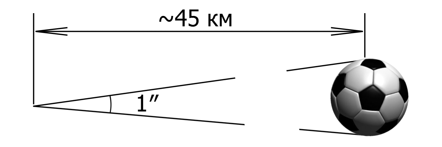 Մեկ անկյան վայրկյանը մոտավորապես համապատասխանում է այն անկյանը, որի տակ երևում է ֆուտբոլային գնդակը մոտ 45 կիլոմետր հետավորությունից.